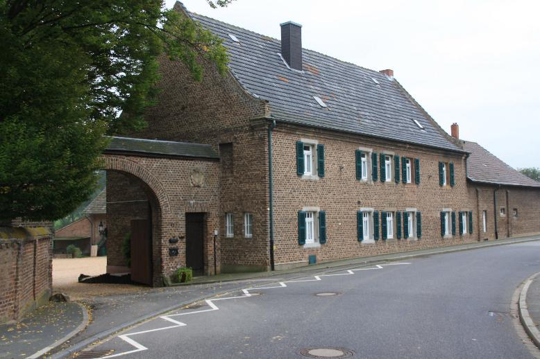 Außenansicht des Trompeterhofes in Nörvenich